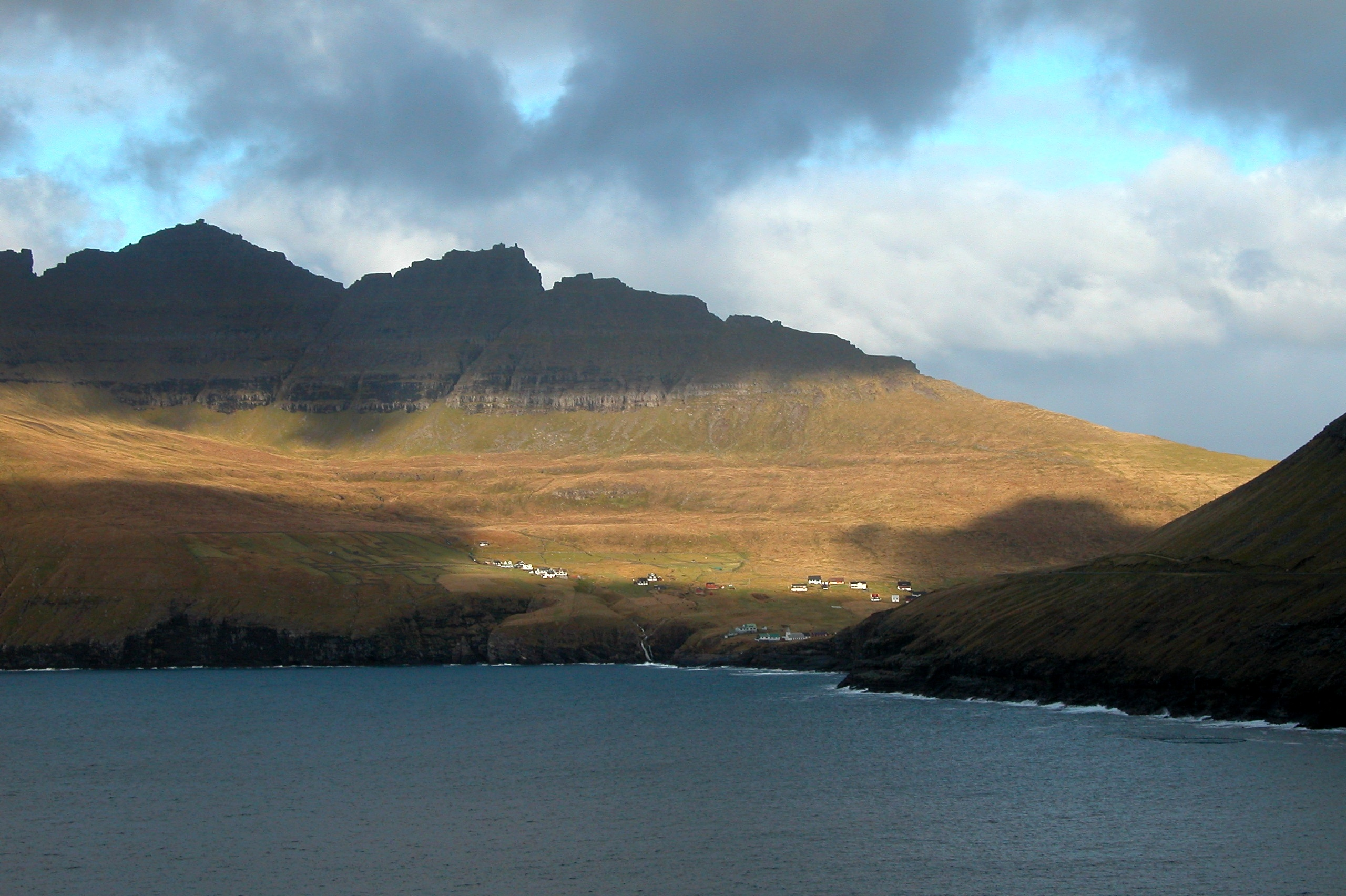 Viðareiði on Viðoy, Faroe Islands. View westwards.